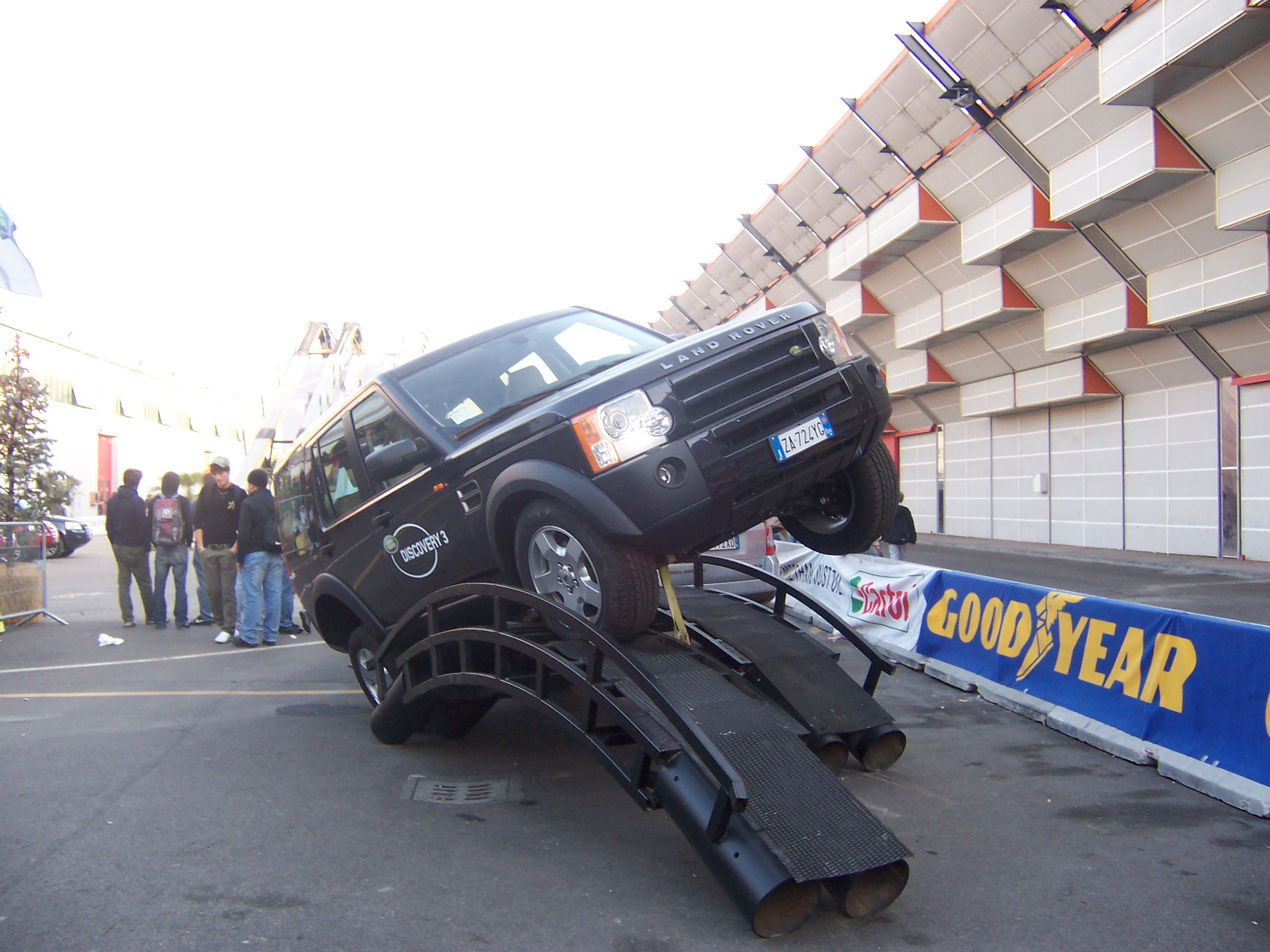 Foto fatta personalmente al Motorshow di Bologna 2006